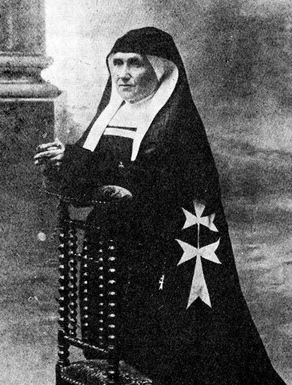 Histoire de l'Ordre Hospitalier du Saint-Esprit Auteur Paul Brune Éditeur C. Martin, 1892